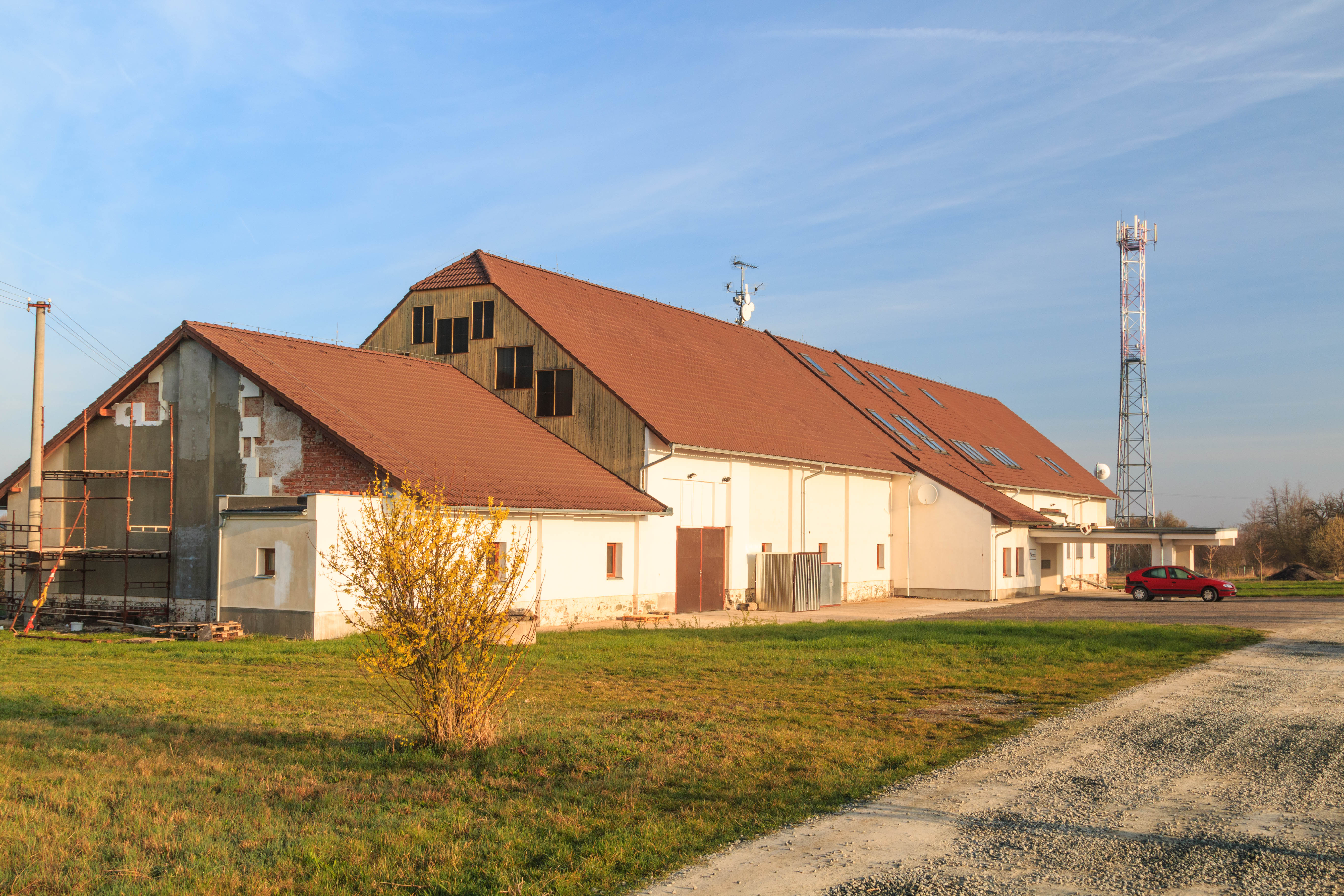 Podhorky u Choltic - dům čp. 323